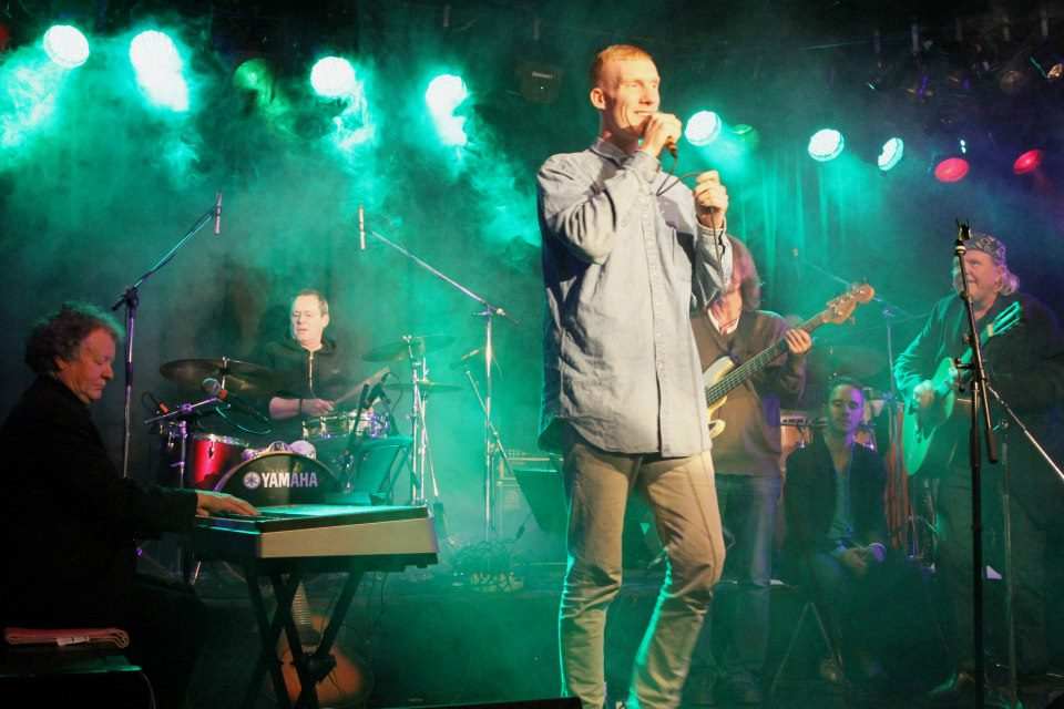 Kapten Röd uppträder på utdelningen av Spingo-stipendiet 2012.